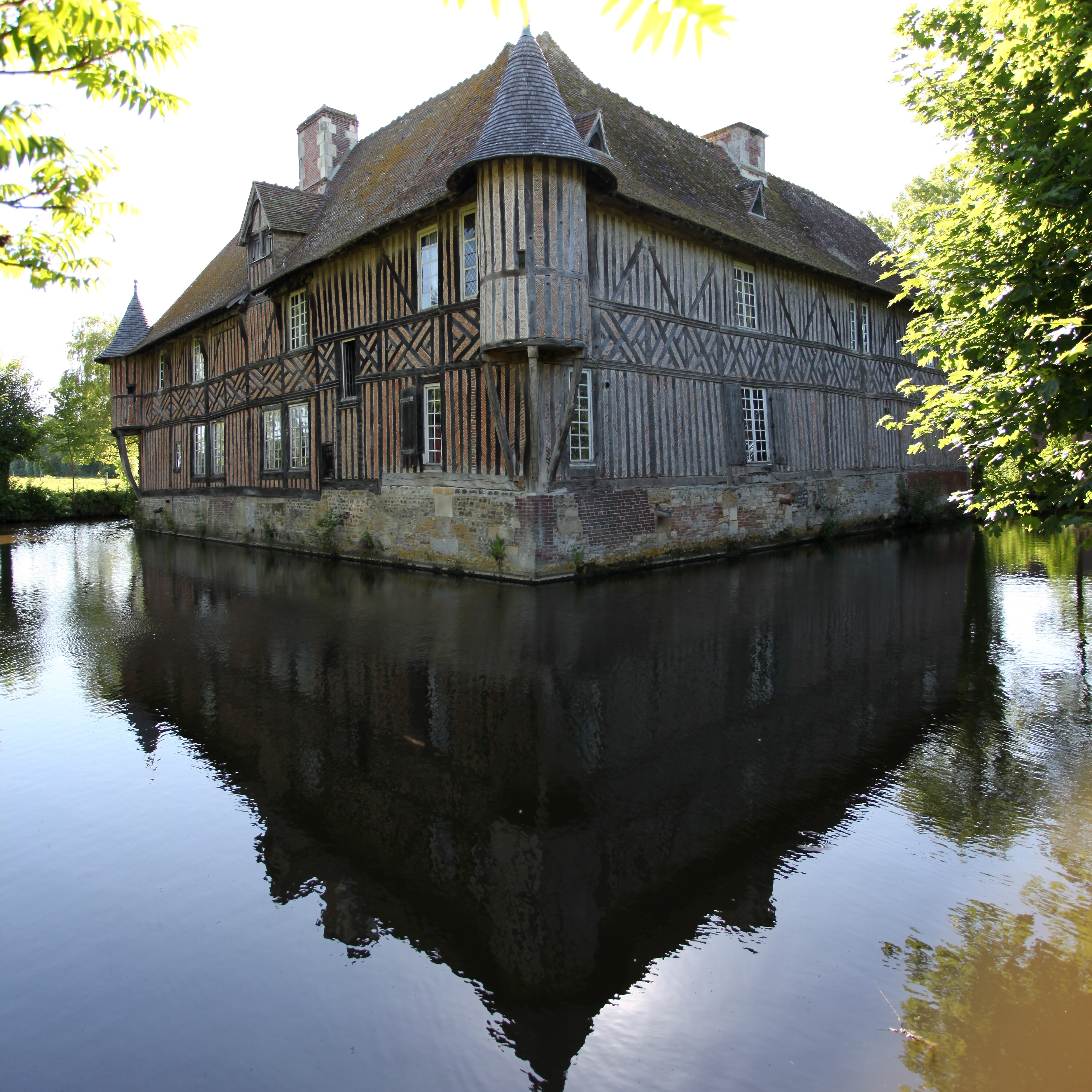 Manoir de Coupesarte, Calvados, France, vue depuis l'Est, en direction de l'Ouest.